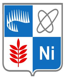 Герб г. Заполярный, Мурманская область с 25 сентября 2008 года